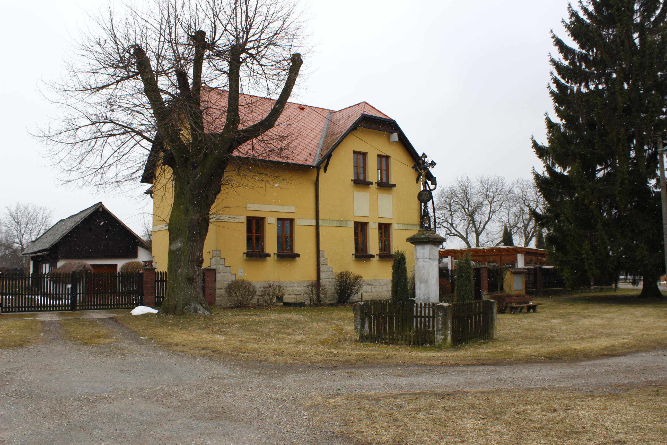 Dům číslo popisné 24 ve Spikalech, části Katusic.